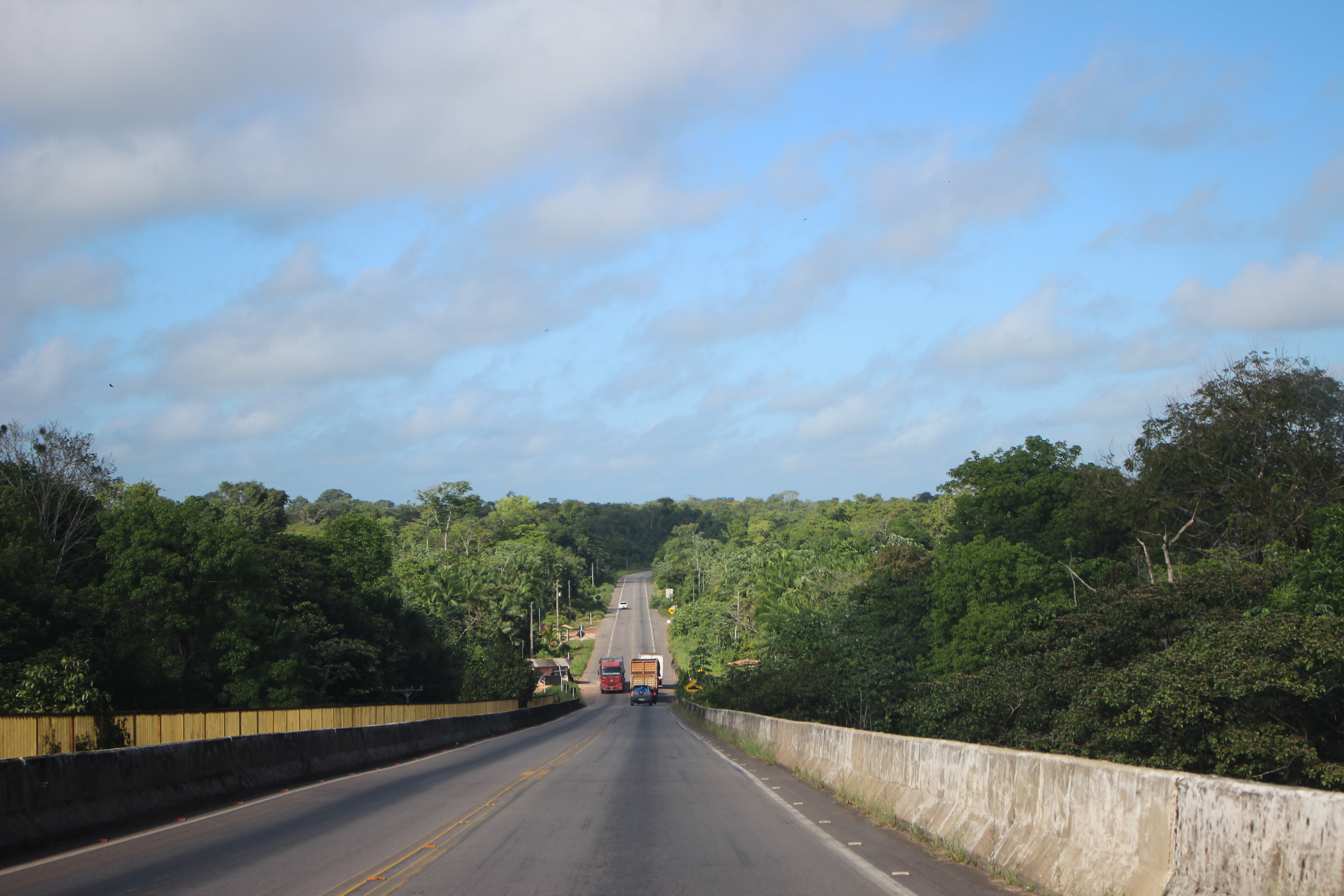 ponte sobre rio acará